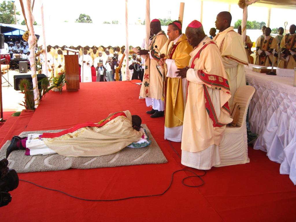 Pendant la litanie des saints